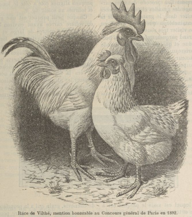 Représentation de la Race de poule de Vilthé